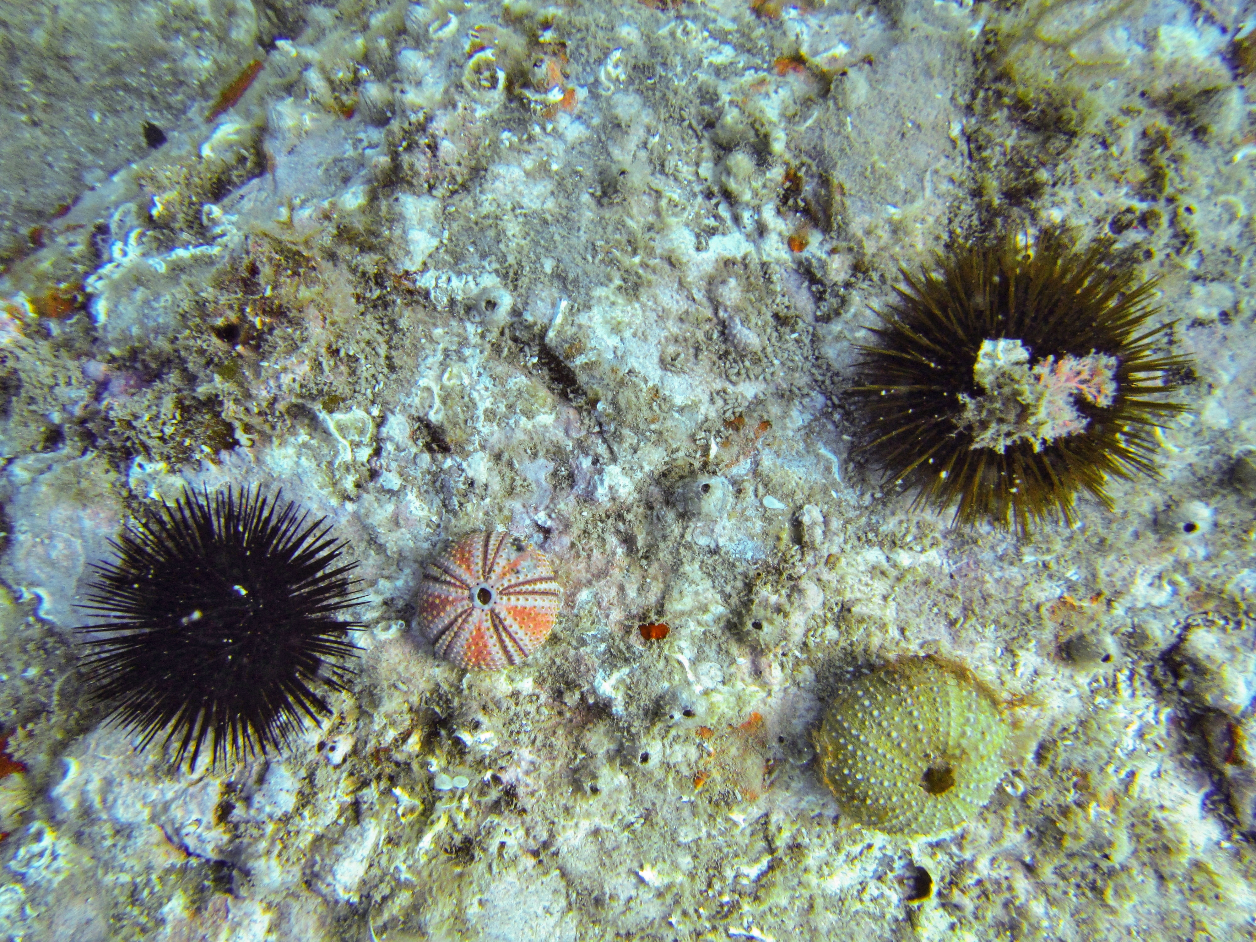 Les deux principaux oursins de Méditerranée et leurs squelettes respectifs : l'oursin noir Arbacia lixula et l'oursin violet Paracentrotus lividus.